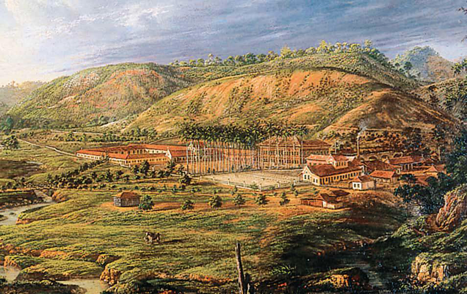 Fazenda Paraiso oléo sobre tela Nicola Facchinetti